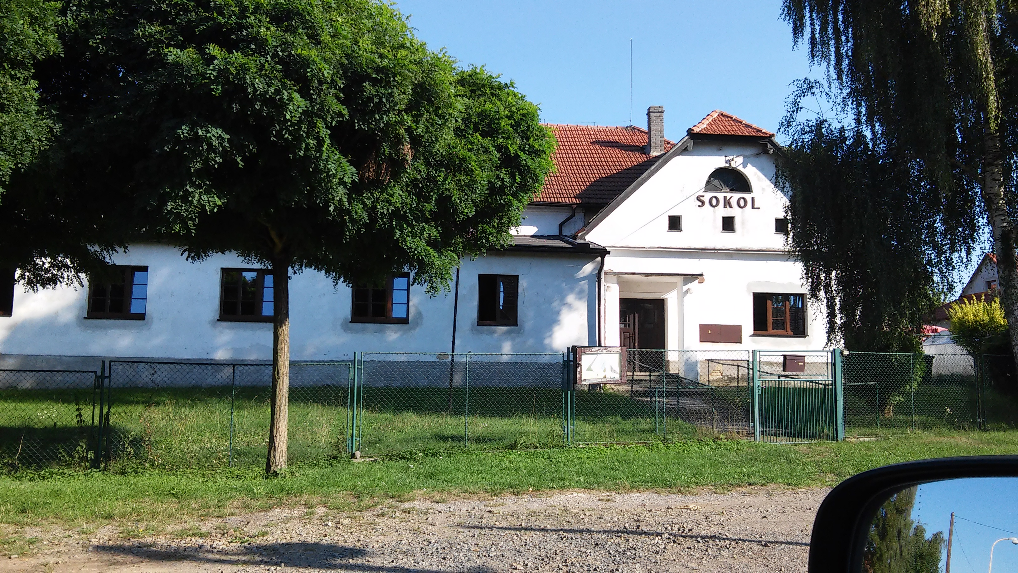 Milostínský sokol